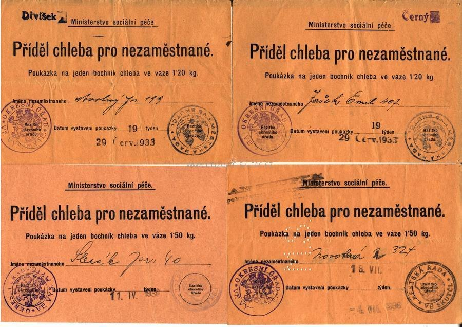 Poukázky Ministerstva sociální péče na příděl chleba pro nezaměstnané z let 1933 a 1936 Poukázka na 1 bochník chleba ve váze 1,20 kg /4x o váze 1,5 kg/. Poukázky opatřeny razítky Okr. úřadu ve Vys. Mýtě a Městskou radou ve Skutči.